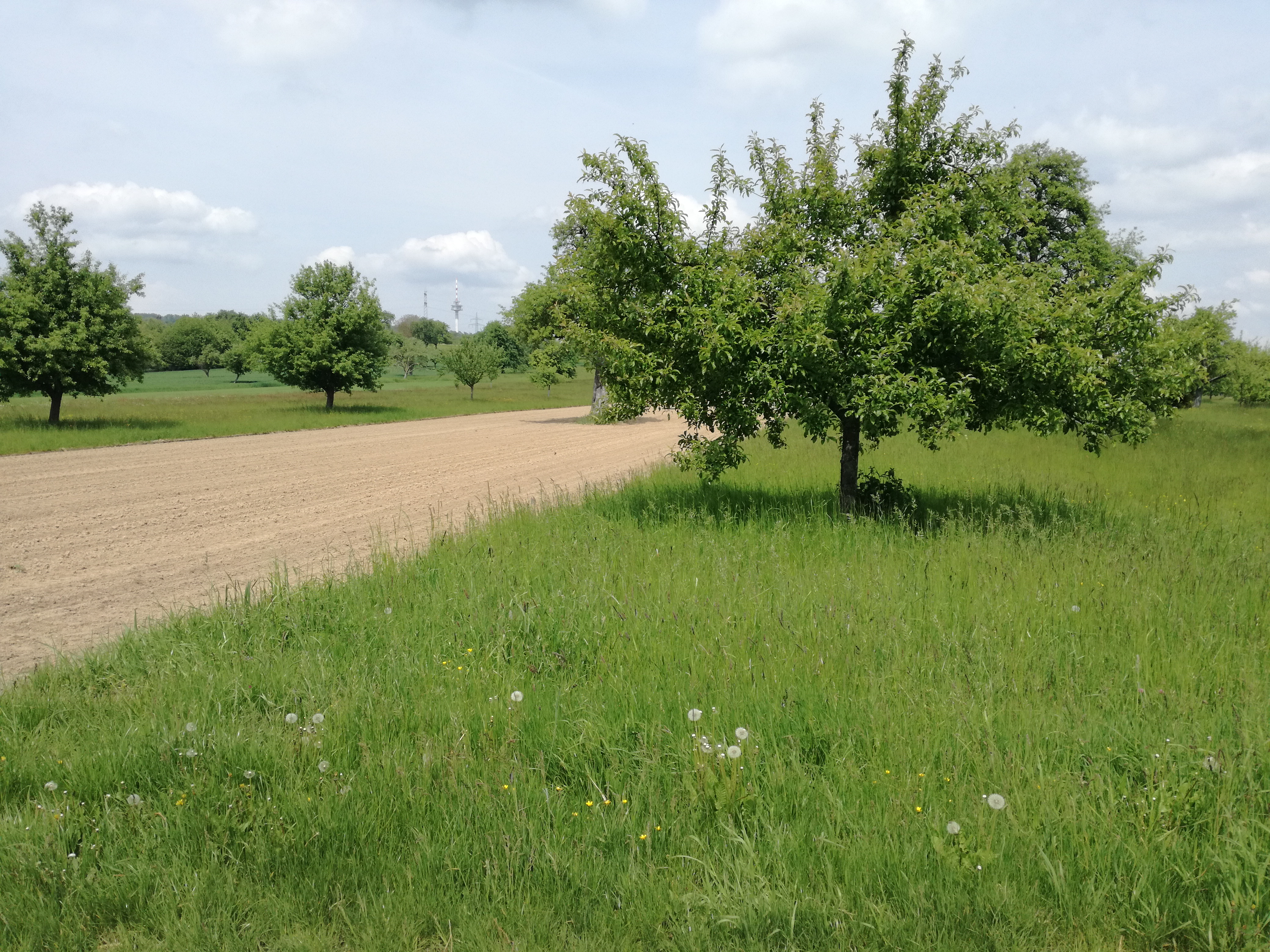 Landschaftsschutzgebiet Waldbronner Albgau (LSG:BW-2.15.058) bei Waldbronn (Baden-Württemberg) nördlich des Ortsteils Busenbach, Äcker und Streuobstwiesen am Zehntpfad